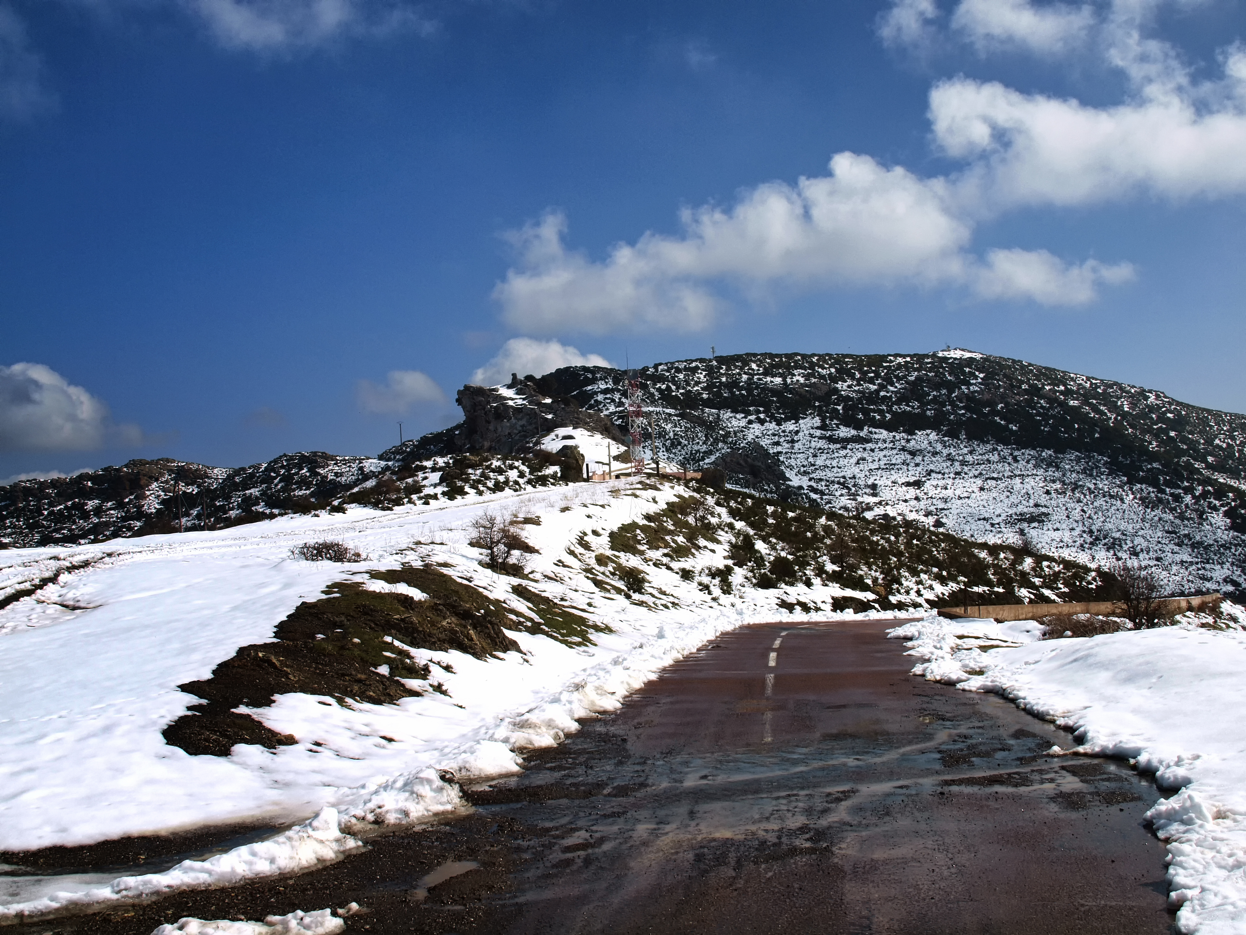 Palasca (Corsica) - Col de San Colombano (692 m) sur la RN 2197